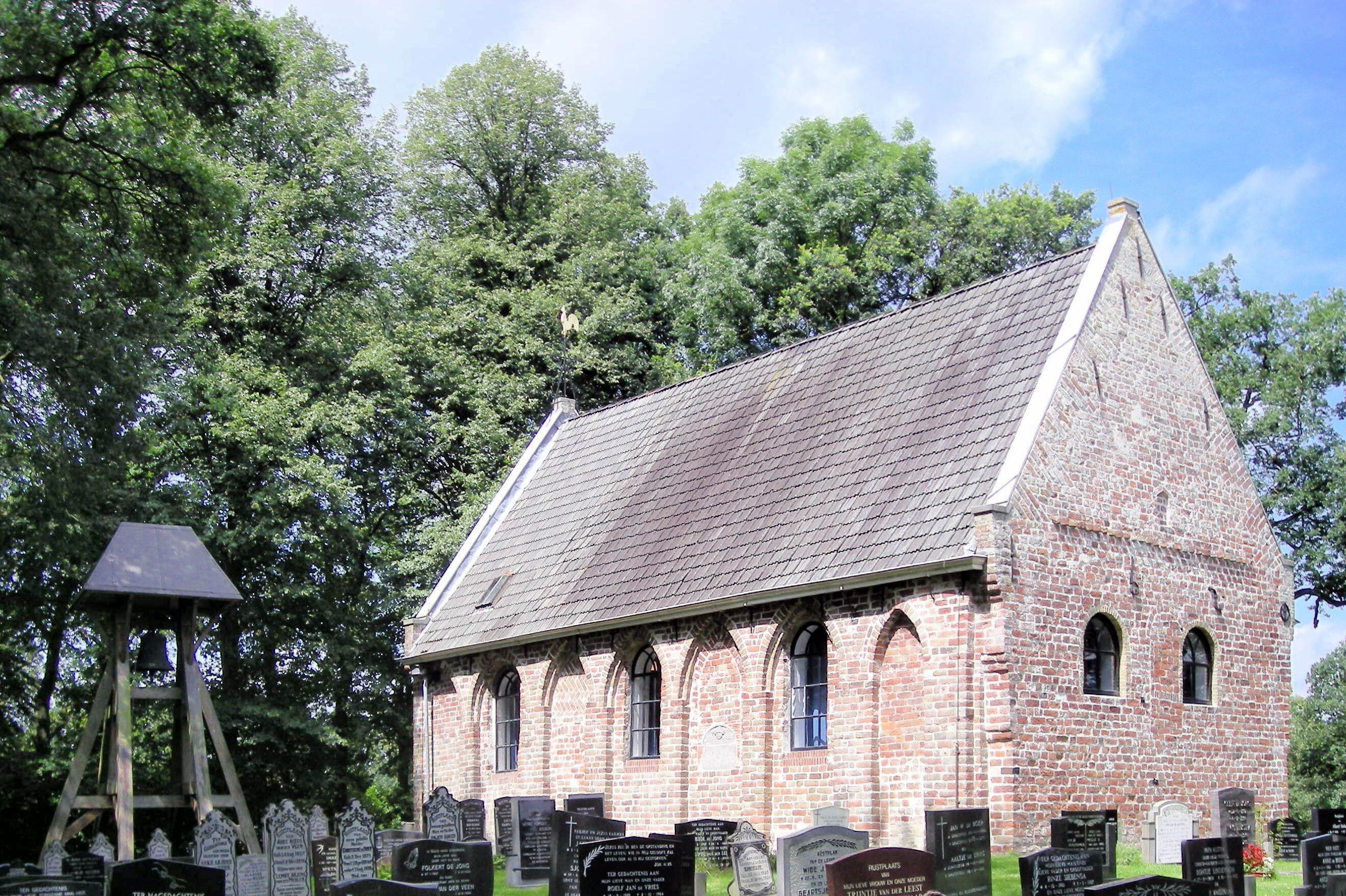 Kerk in klokkenstoel in Kortehemmen